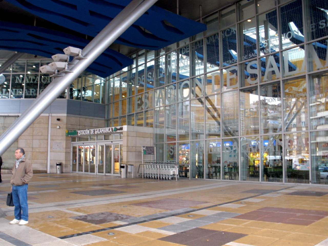 Estación de tren de Salamanca.